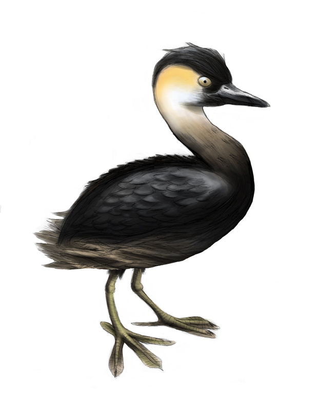 Tachybaptus rufolavatus